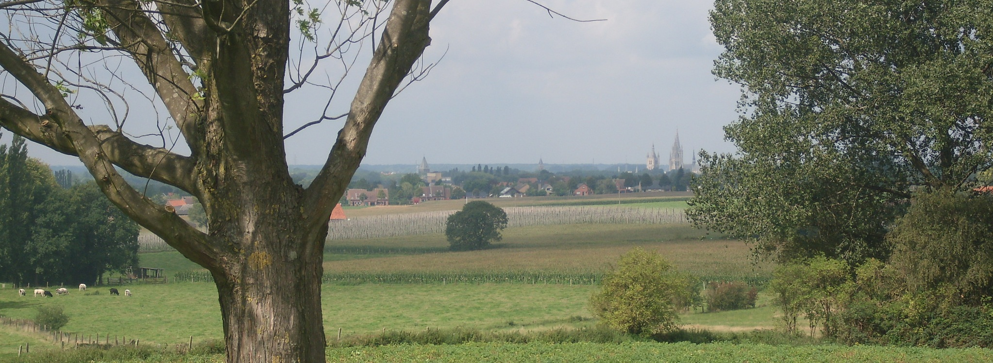 Zicht op Ieper vanop Hill 62 - West-Vlaanderen - België